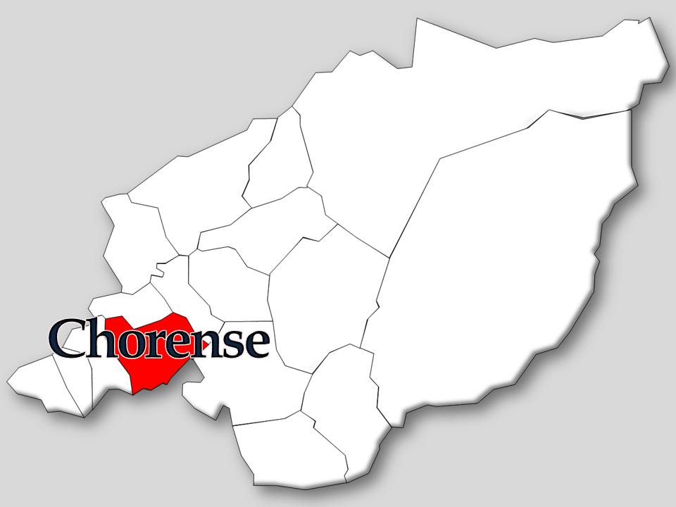 Censos 1864/2011